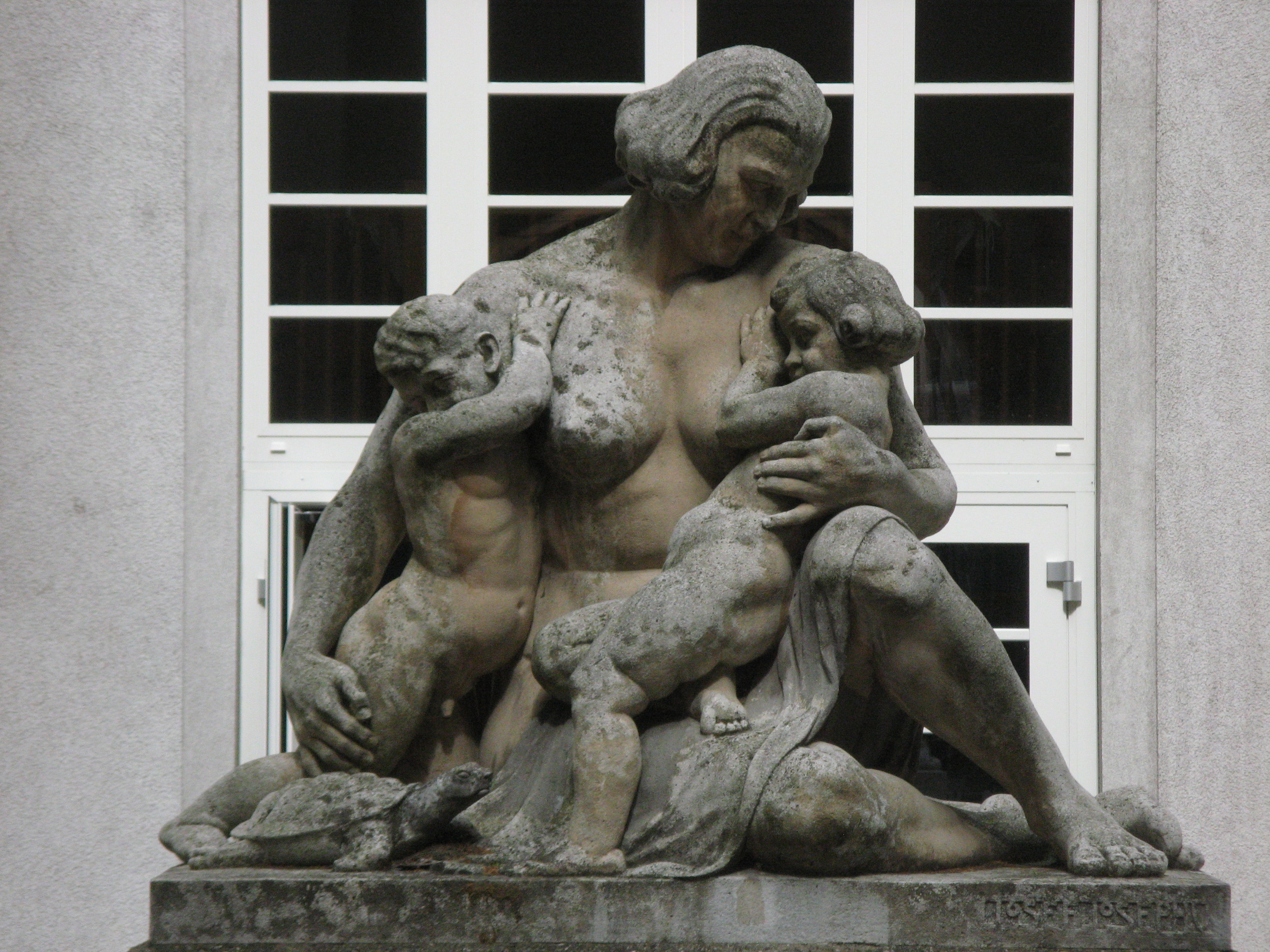 Zuflucht von Joseph Josephu, Pernerstorferhof, Troststraße 68-70, Wien-Favoriten